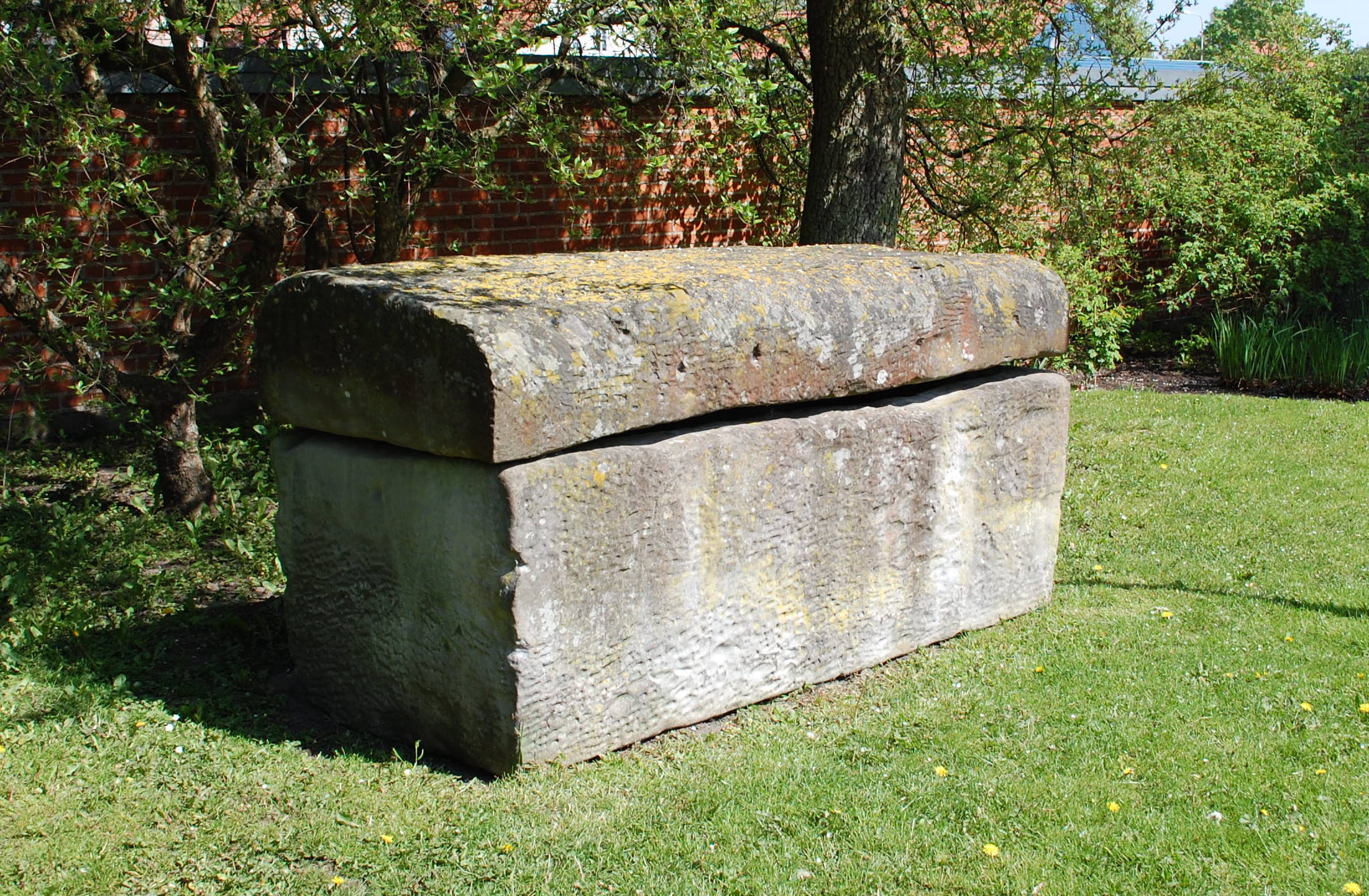 Sarkophag in der Nähe der Ruine der Sankt-Annen-Kapelle